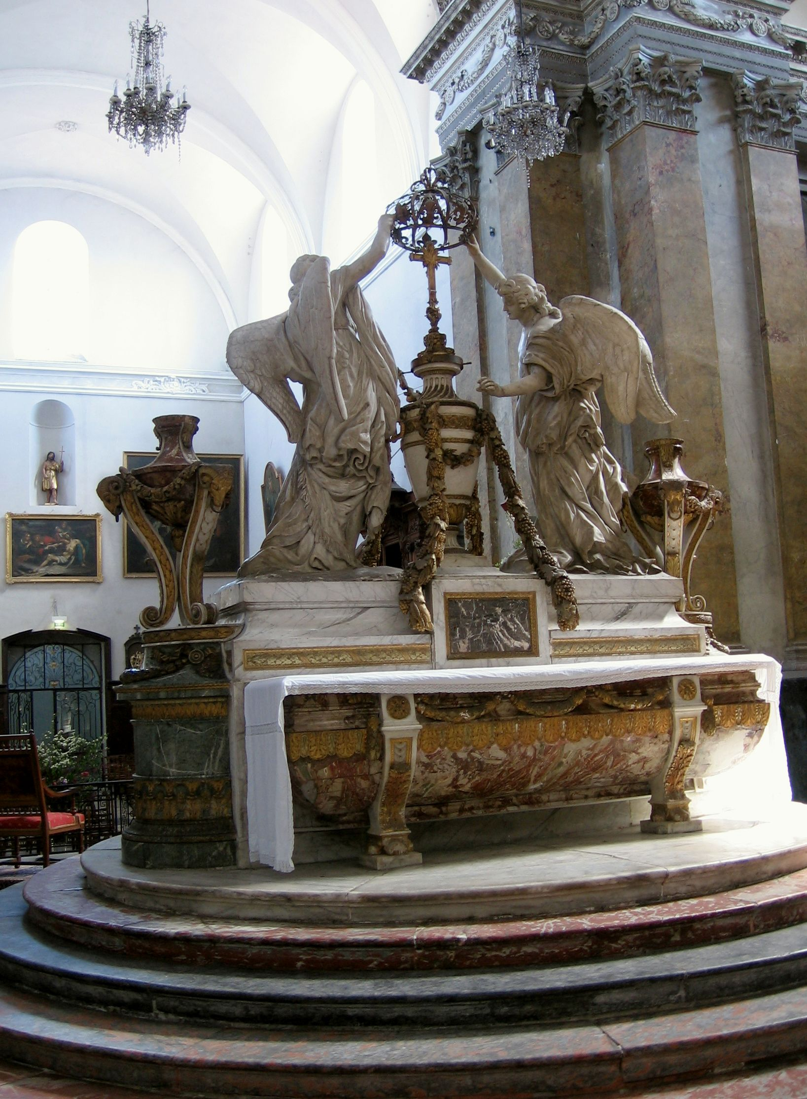 maître-autel de l'église Saint-Pierre des Chartreux (Toulouse), dessiné par Guillaume Cammas.